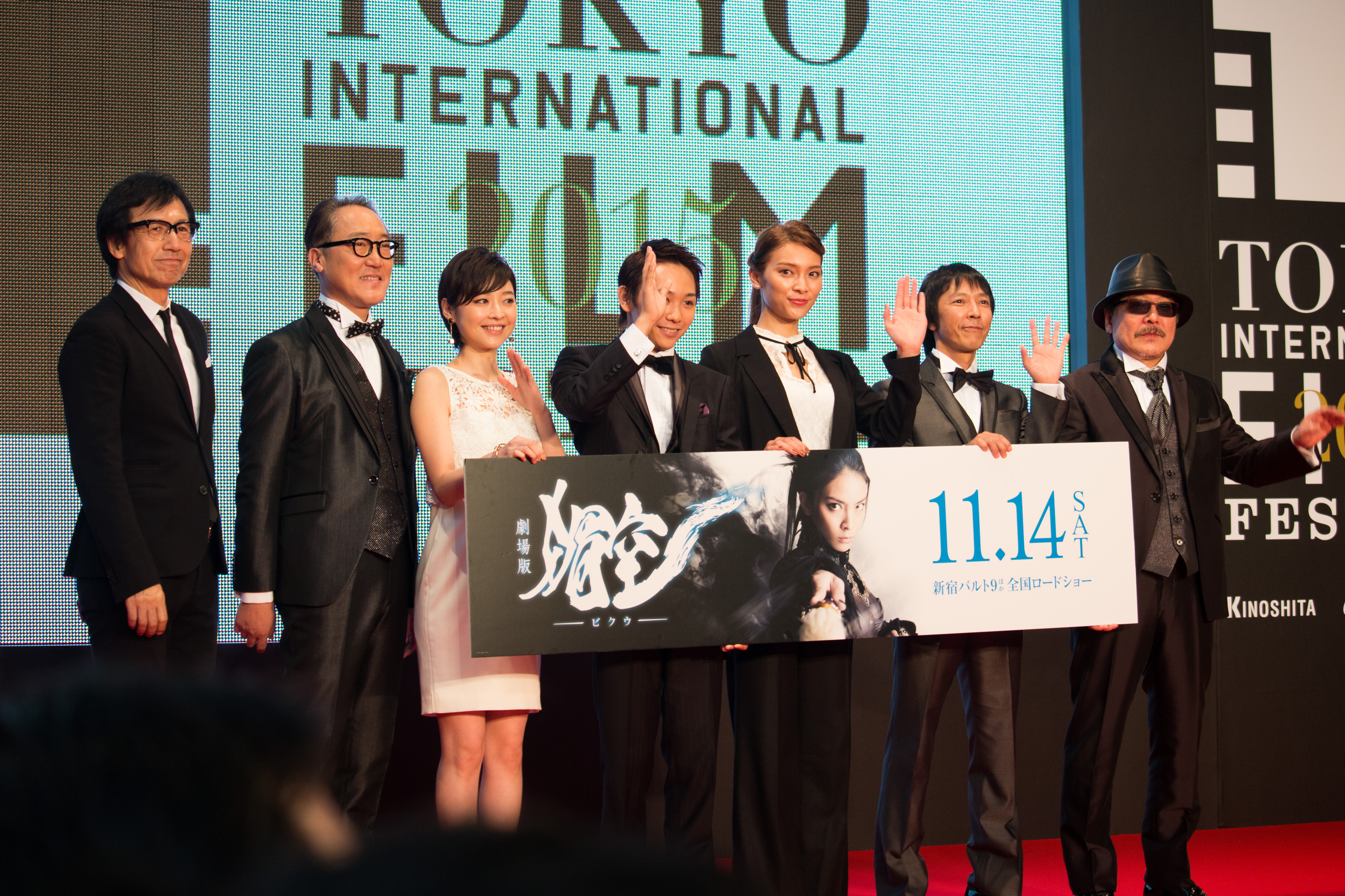 第28回 東京国際映画祭 オープニングセレモニー キャスト クルー (媚空-ビクウ-)